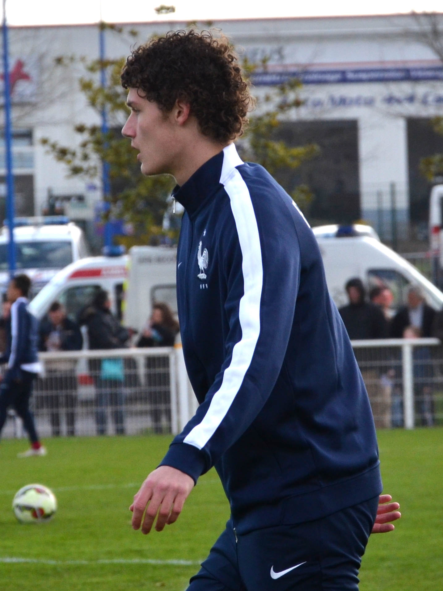 Photographie prise lors du match opposant la France à l'Angleterre pour les qualifications du championnat d'Europe de football des moins de 19 ans 2015 au stade Louis-Villemer de Saint-Lô le 31 mars 2015. Ici, Benjamin Pavard.